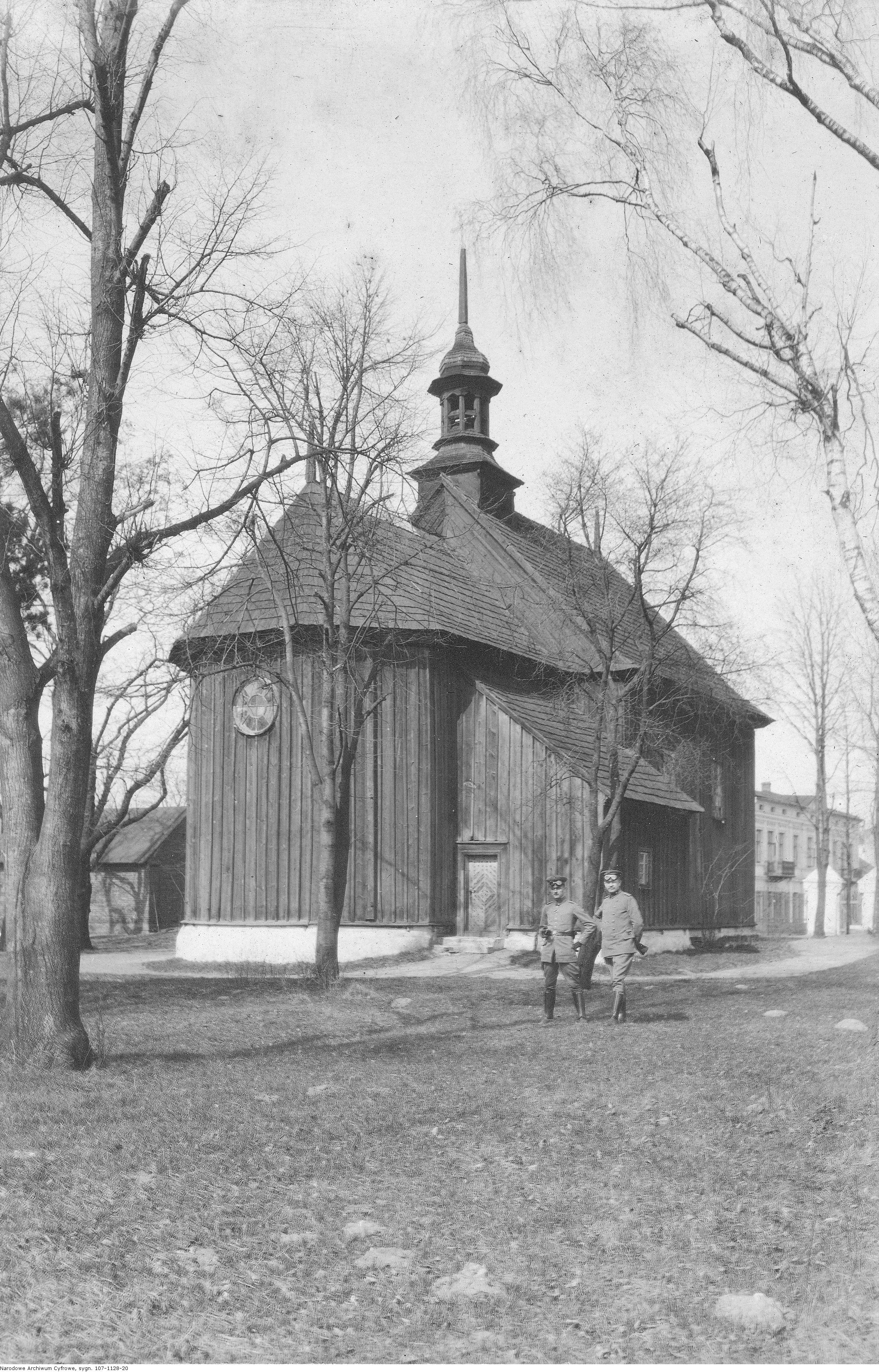 Kościół pw. św. Wacława w Tomaszowie, ul. Wieczność (obecnie ulica Słowackiego). W latach 90. XX w. Kościół przeniesiony do wsi Twarda pod Tomaszowem. W tle istniejąca do dziś kamienica na rogu ulic Krzyżowej i Słowackiego w Tomaszowie Mazowieckim.